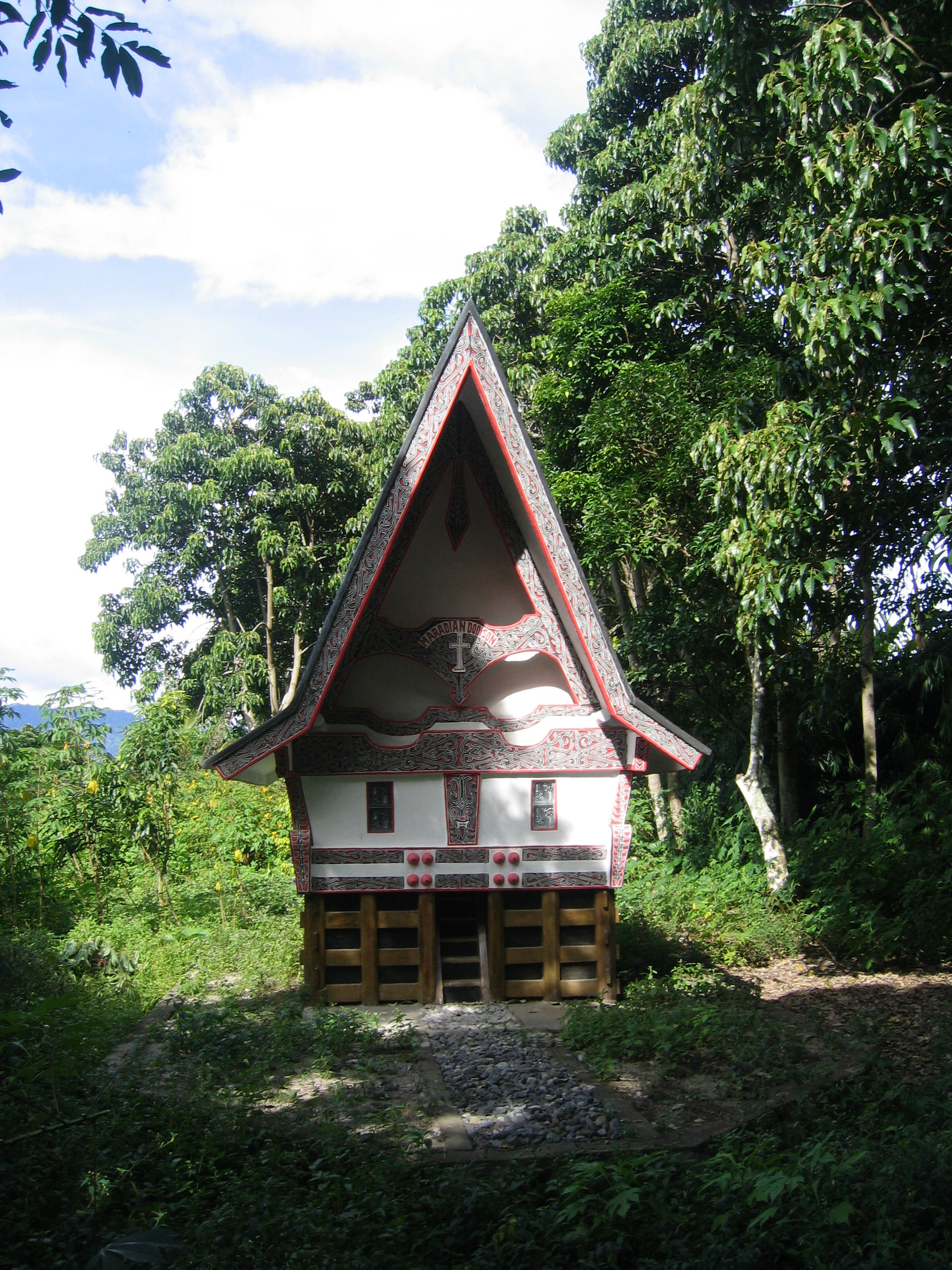 Ahnenhaus der Batak Toba / A traditional Batak house in Samosir, Toba